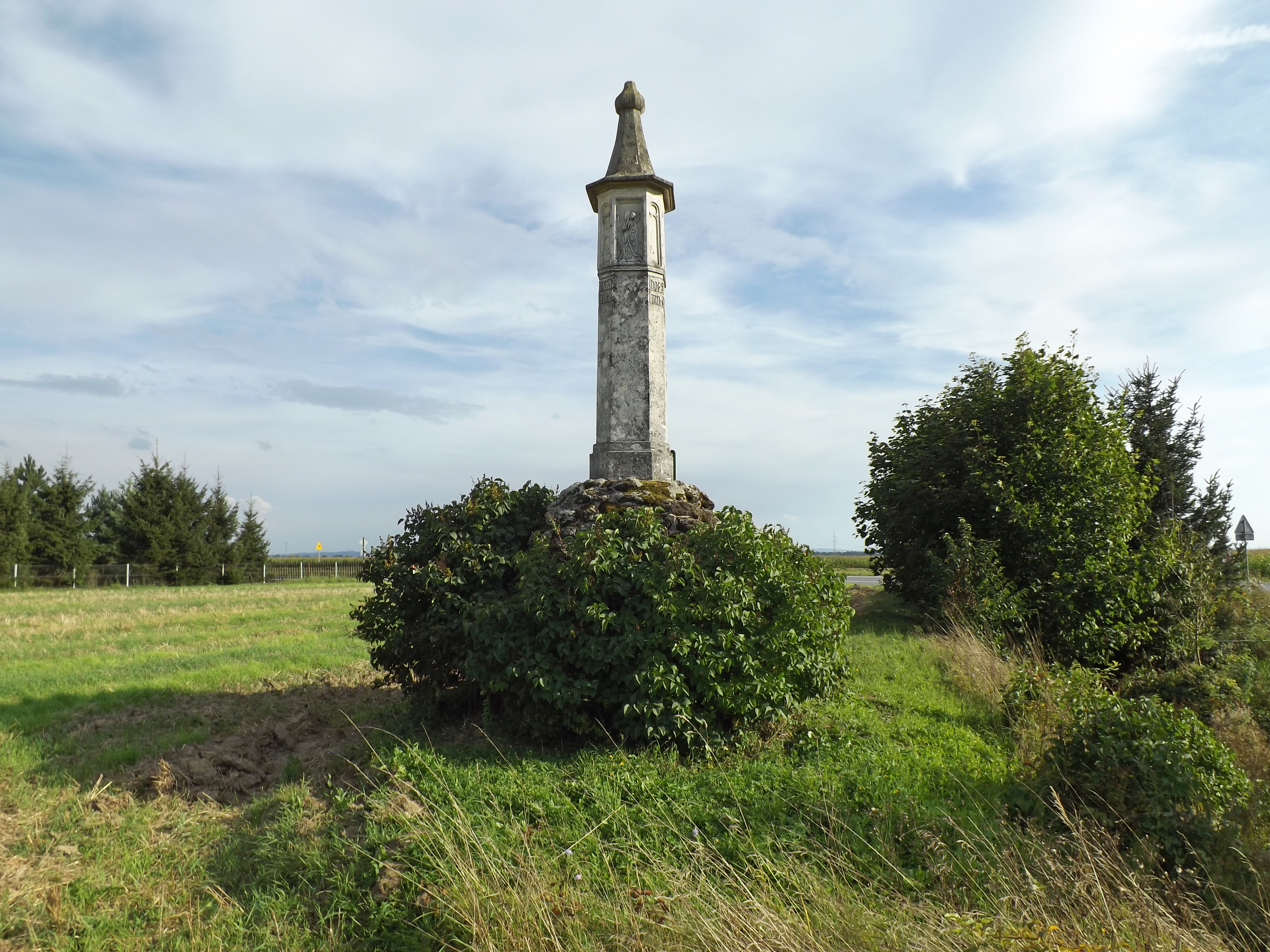 Słup graniczny z 1450 r. majątku ziemskiego biskupstwa krakowskiego we wsi Biskupice Radłowskie